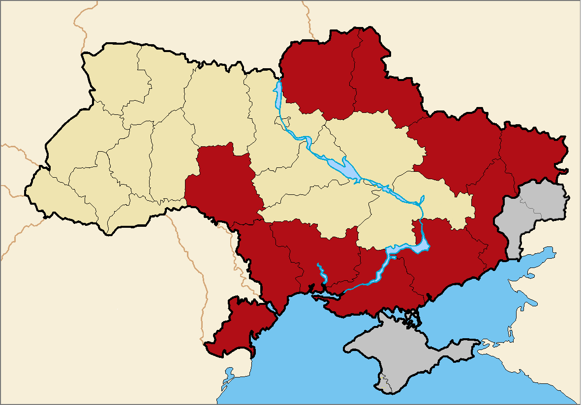 Военное положение в Украине